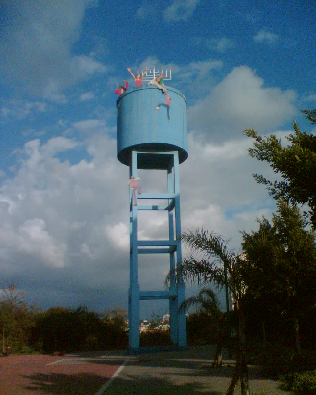 מגדל מים ישן בגבעת שמואל